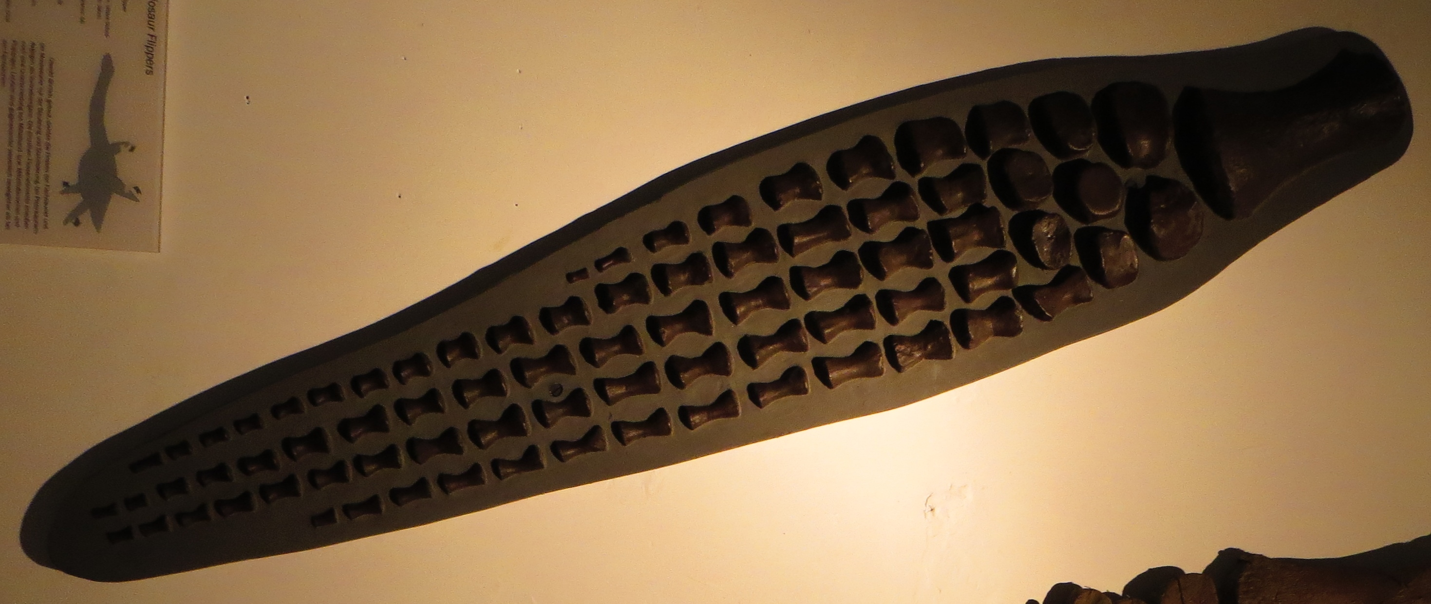 Fossil of Pliosaurus, an extinct reptile - Took the picture at Museum of Paleontology, Tuebingen